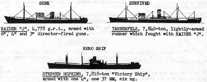 Schattenrisse der am Gefecht vom 27. September beteiligten Schiffe